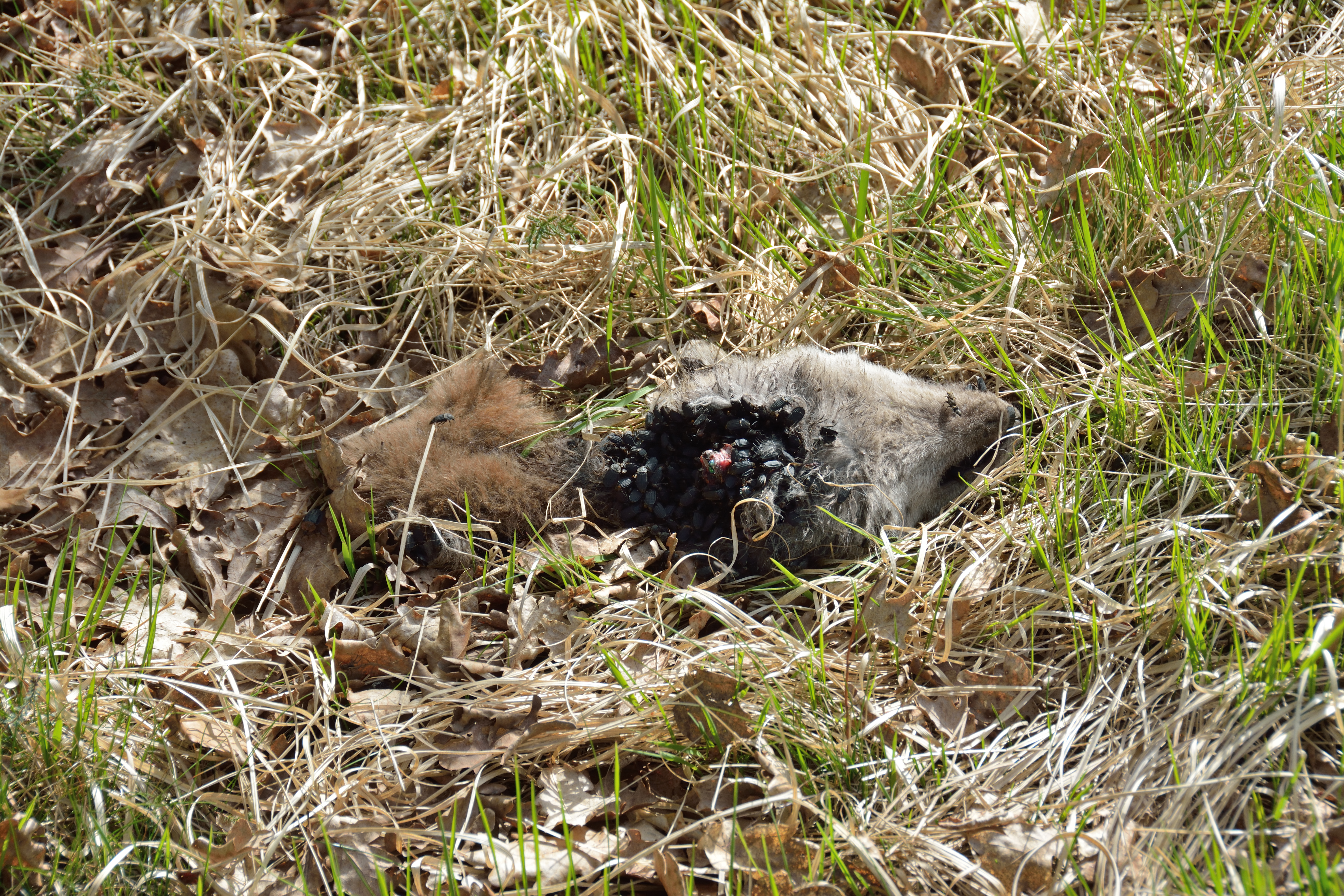 Impressionen aus dem Naturschutzgebiet "Heideflächen bei Kellinghusen" in Schleswig-Holstein vom Mai 2015 Es ist das Naturschutzgebiet mit der Nummer 22 Kopf eines Rotfuchse (Vulpes vulpes) mit Käfern Gerippter Totenfreund (Thanatophilus sinuatus)